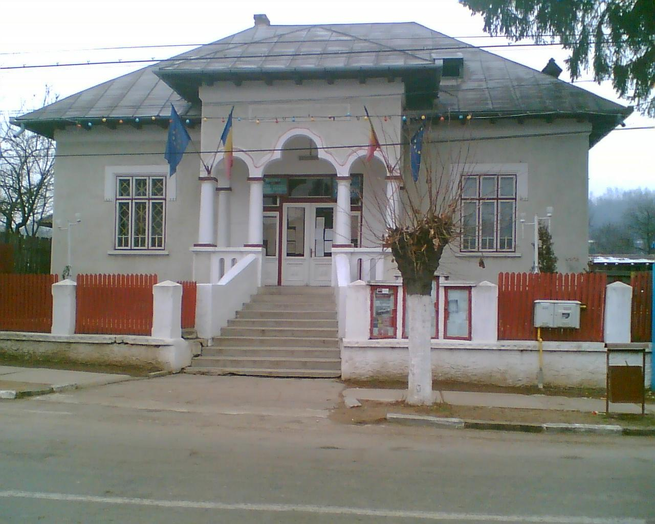 Primaria